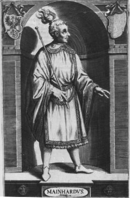 Meinhard I. von Tirol (Meinhard III. von Görz) (* vor 17. Jänner 1194; † 22. Juli 1258) aus der Familie der Meinhardiner war Graf von Görz und Istrien (1220–1258) und Graf von Tirol (1253–1258) sowie Vogt von Aquileia, Trient, Brixen und Bozen. Stich